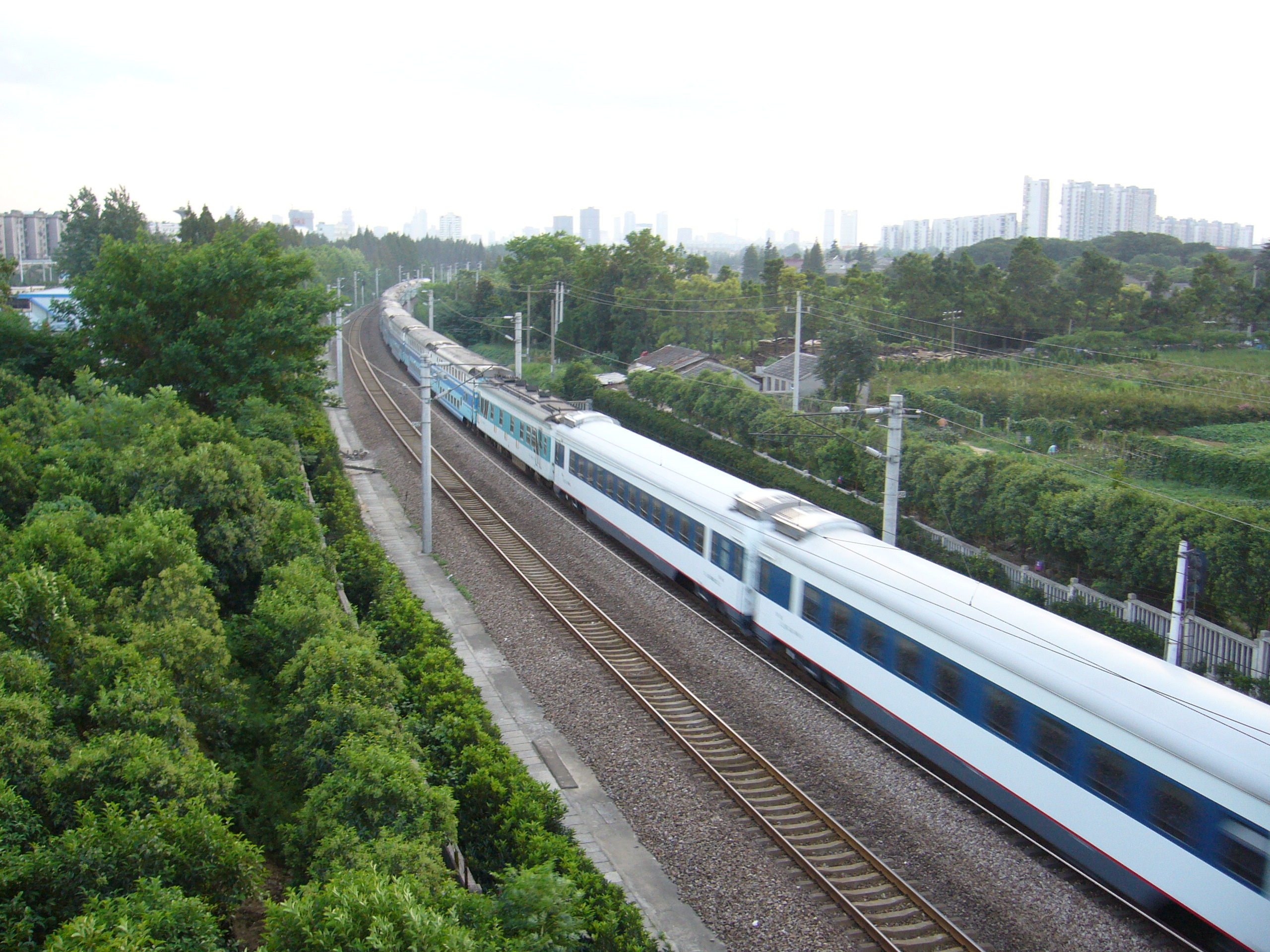 宁镇公路旁疾驰的火车